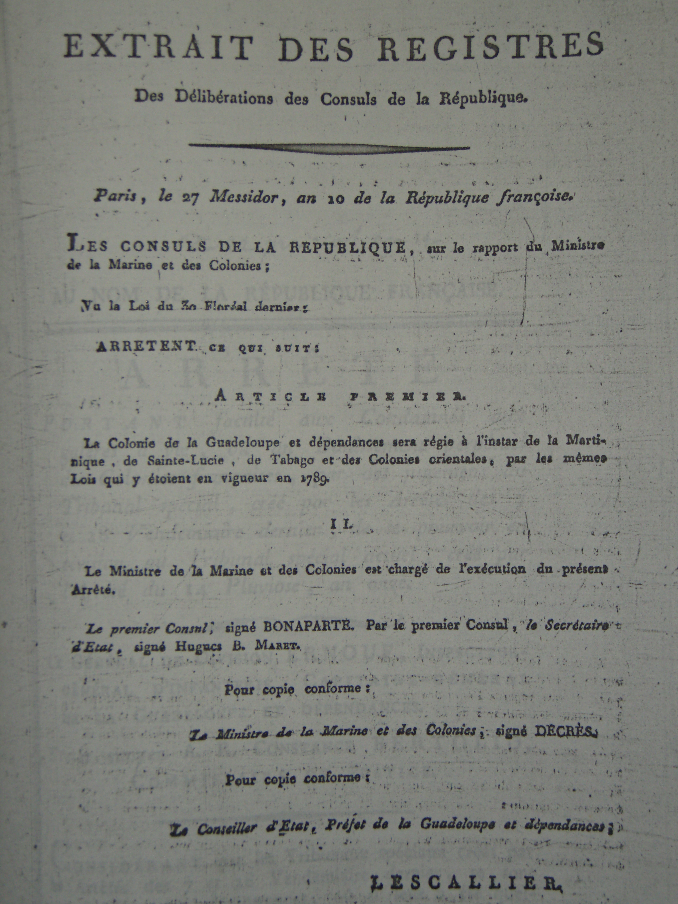 Arrêté consulaire de Bonaparte rétablissant l'esclavage à la Guadeloupe du 16 juillet 1802 : version imprimée localement du texte diffusée par la circulaire du 6 prairial an XI (ANOM, C7A 59 ; ADG 5J 60 et 1 Mi 8)